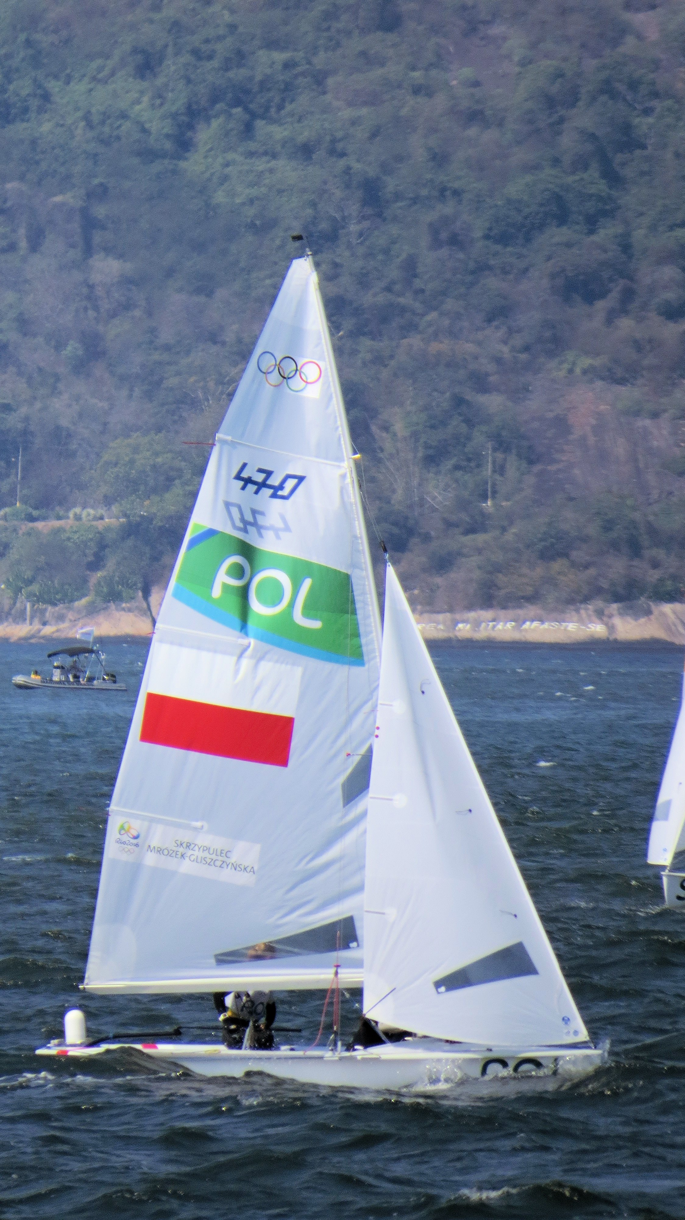 470 (dinghy) class: Irmina Mrózek Gliszczyńska and Agnieszka Skrzypulec.